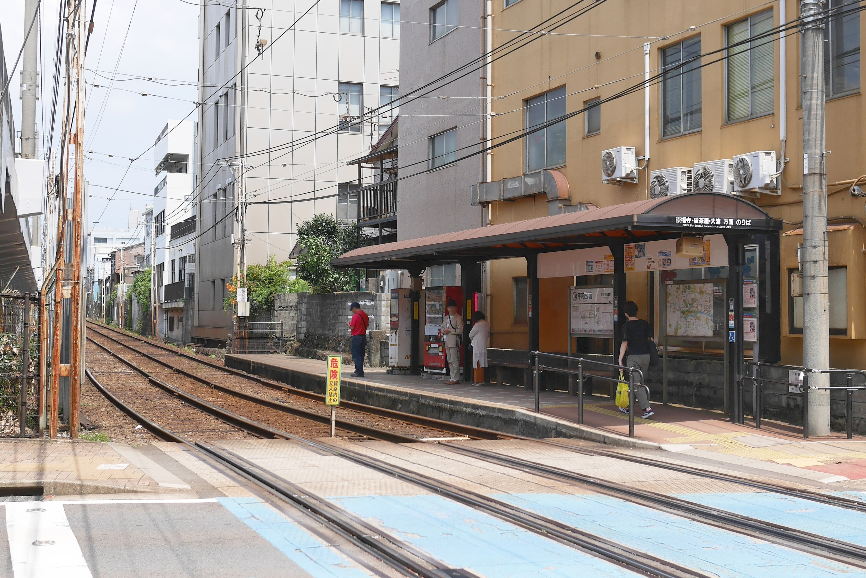 長崎電気軌道の平和公園停留場、崇福寺・蛍茶屋・大浦方面のりば（長崎県長崎市）。2018年8月に松山町から改称された。